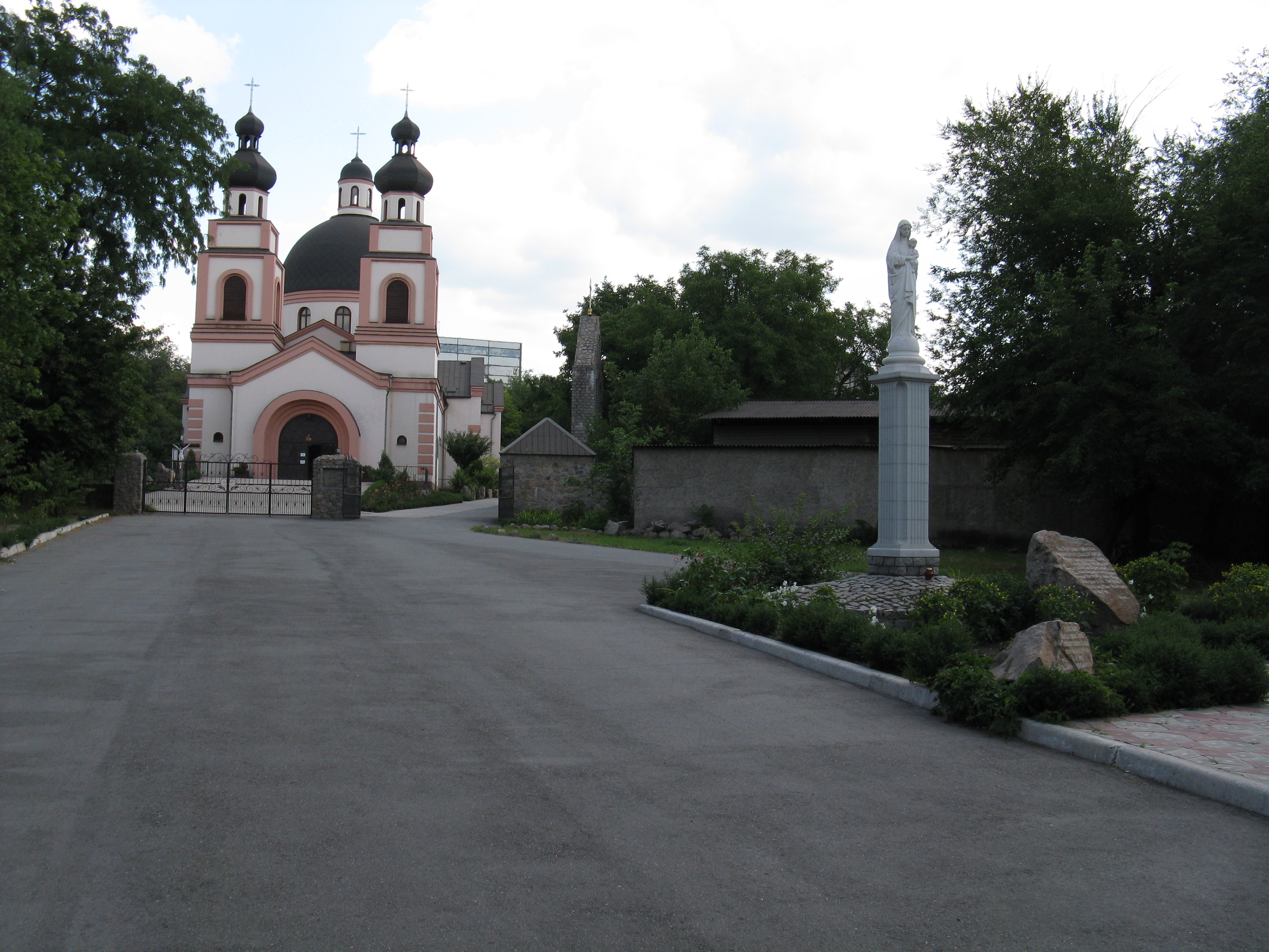 Римо-католицький собор Отця милосердного у Запоріжжі